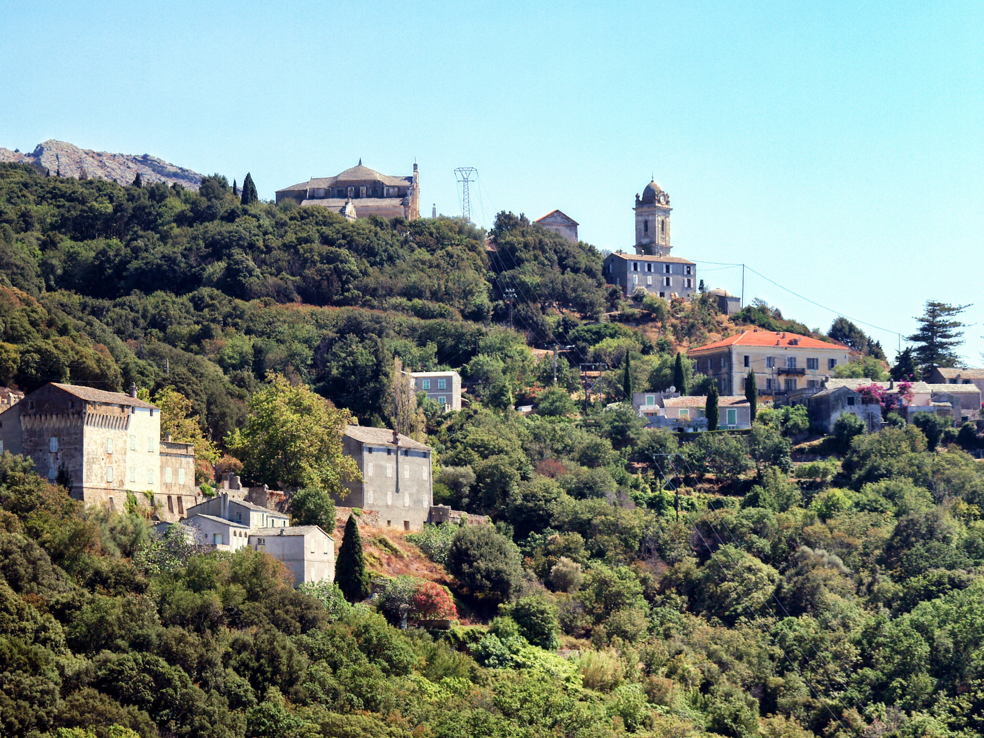 Centuri, Cap Corse - Vue de Camera, dominé par l'ensemble paroissial Saint-Sylvestre. À gauche, le château de Merlacce Tour